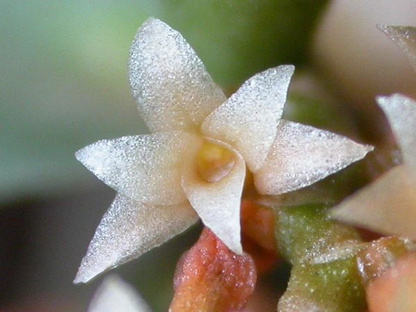 Campylocentrum neglectum - São Paulo